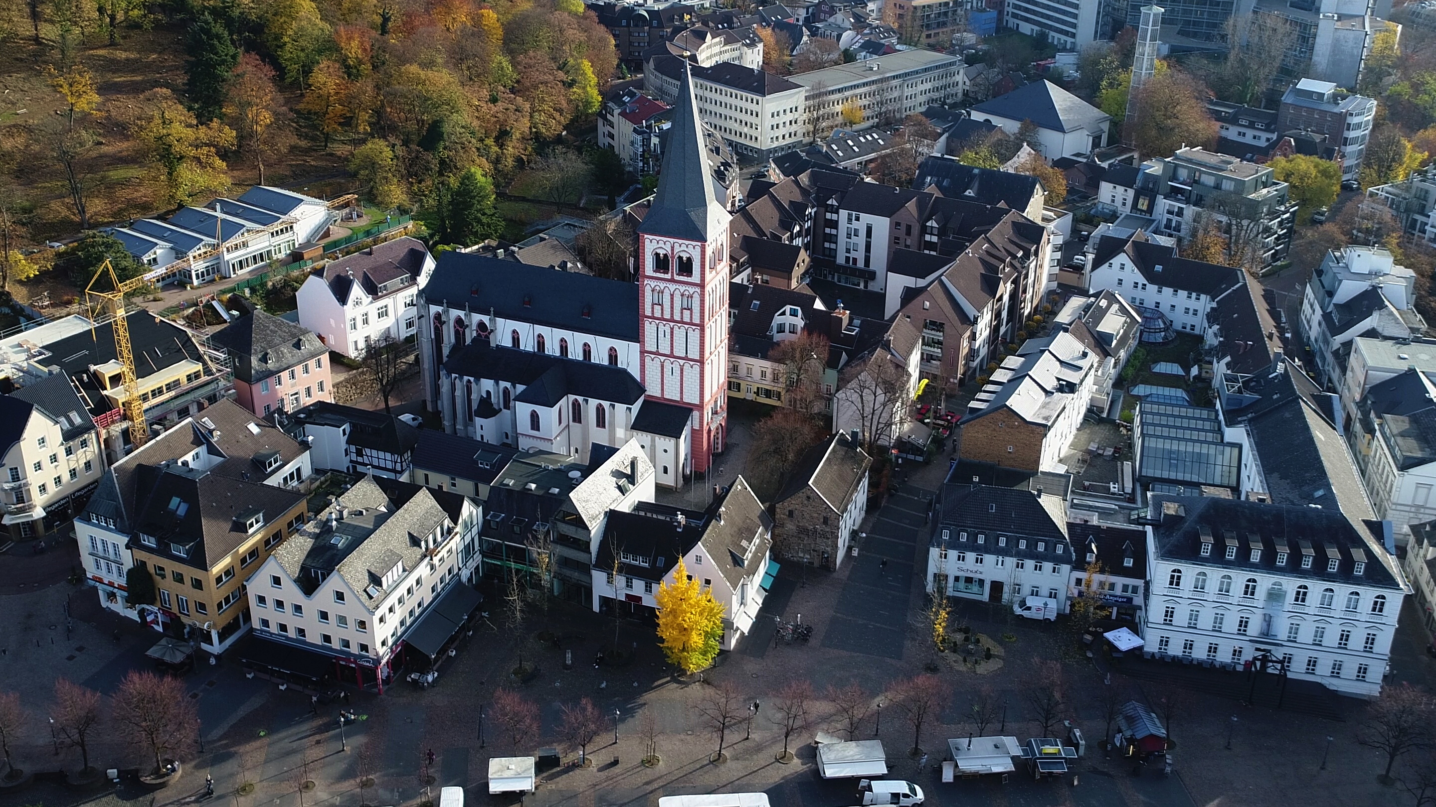 Siegburg, Pfarrkirche St. Servatius aus der Vogelperspektive (2018)